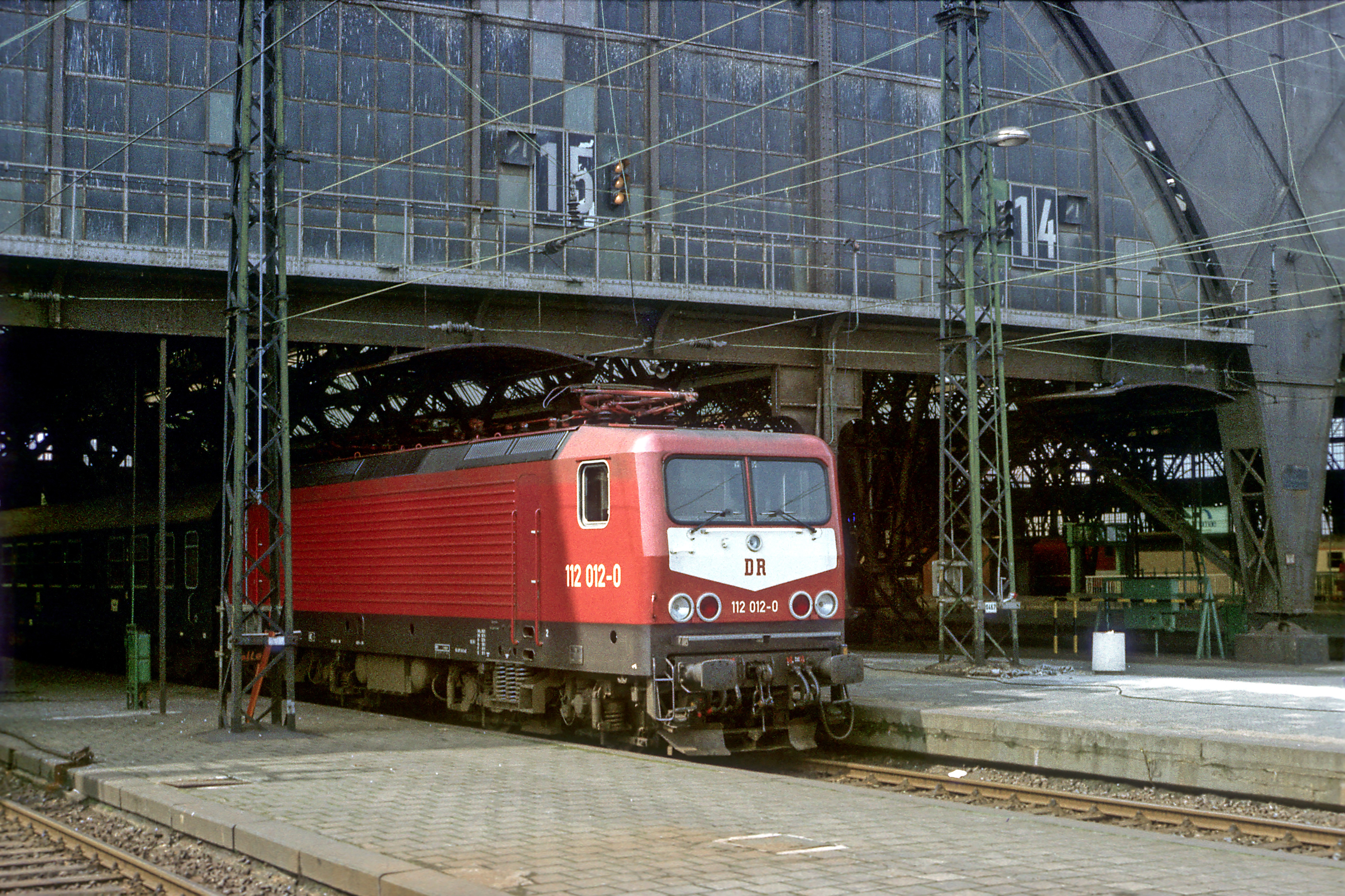 abfahrbereit auf Gleis 15. Der Anstrich mit »DB-Latz« wurde nur kurze Zeit angewendet.